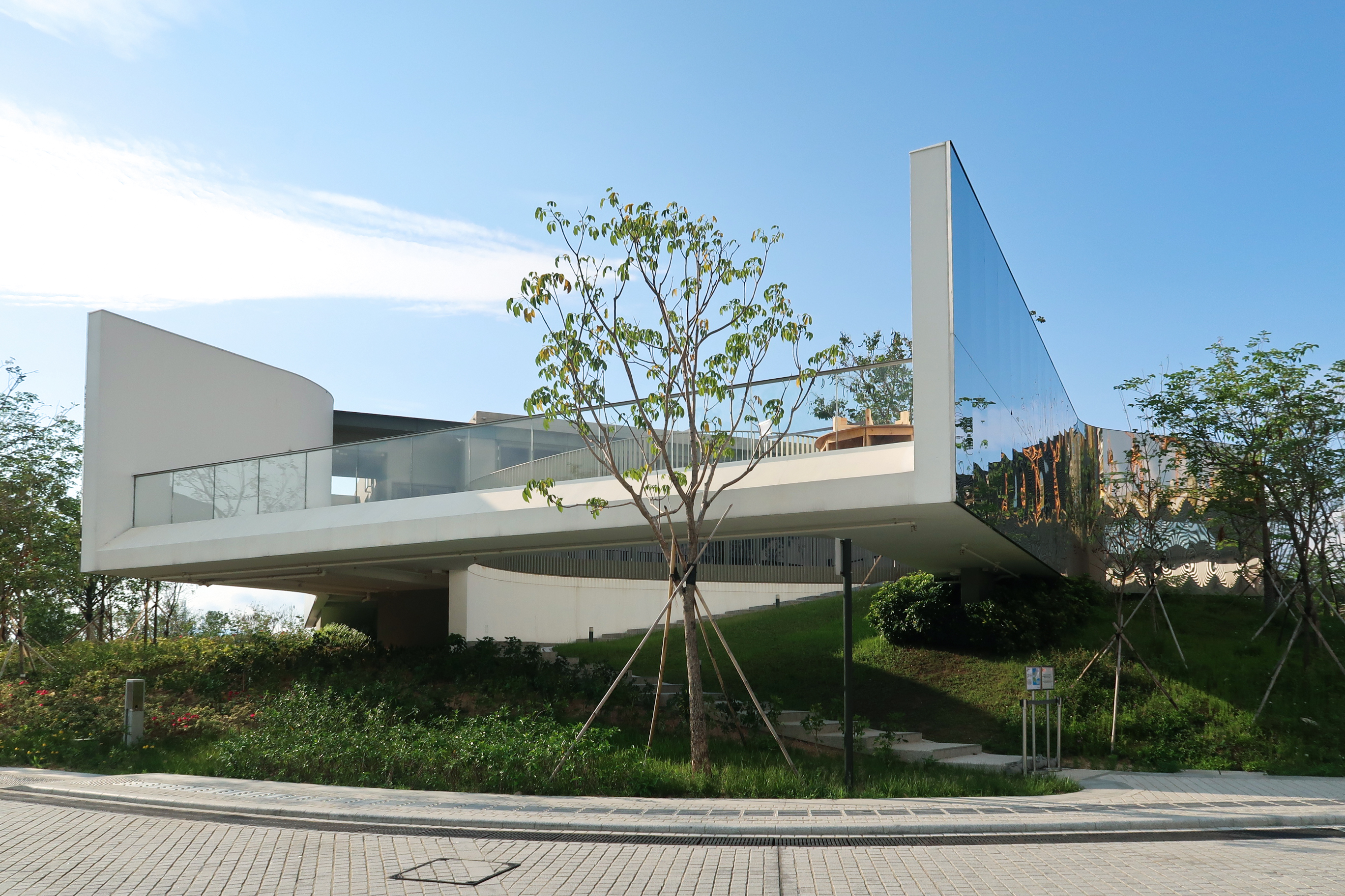 M+ Pavilion